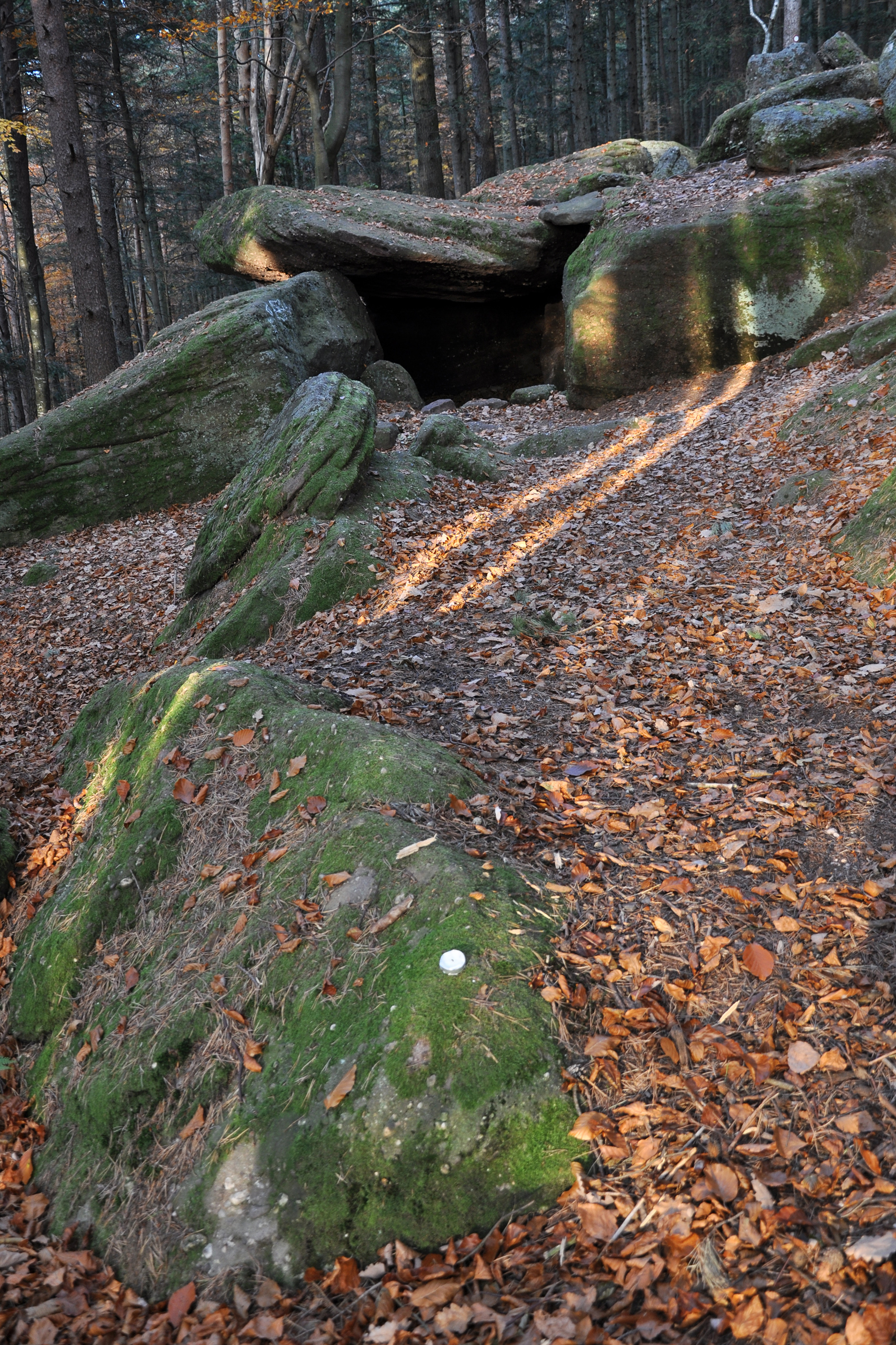 la "Grotte des Druides" près du Mur Païen. Photo prise le 1er Novembre 2011, une bougie est restée en place sur une pierre ; le 1er Novembre est la fête de Samhain pour les Néo-païens et les Wiccans.